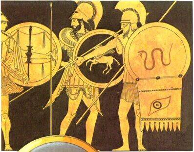 Fobos i Dejmos